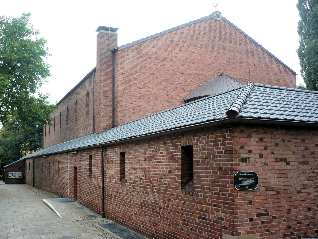 St. Bonifacius-Kirche in Essen-Huttrop